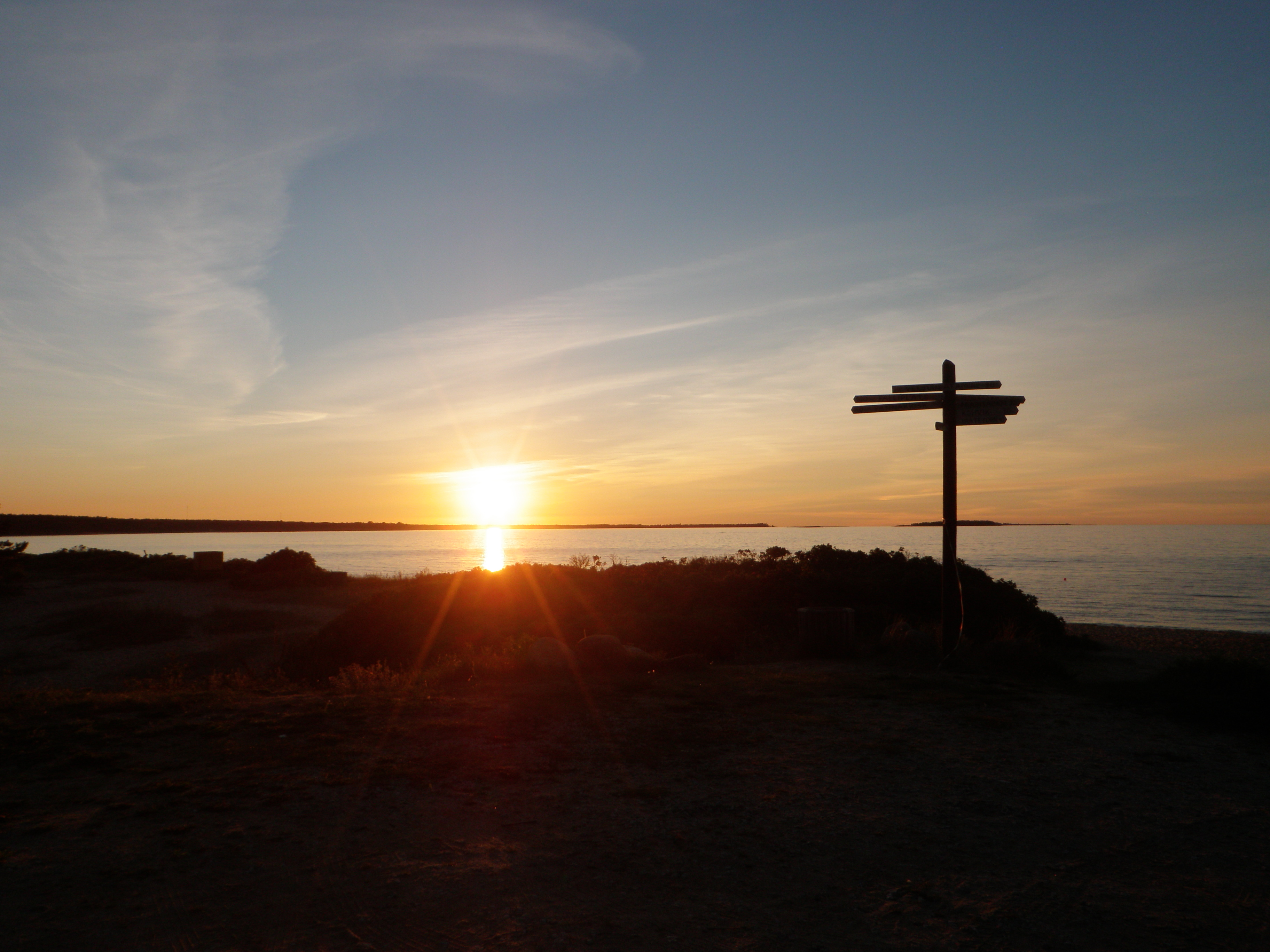 Päikeseloojang Salmistu rannas